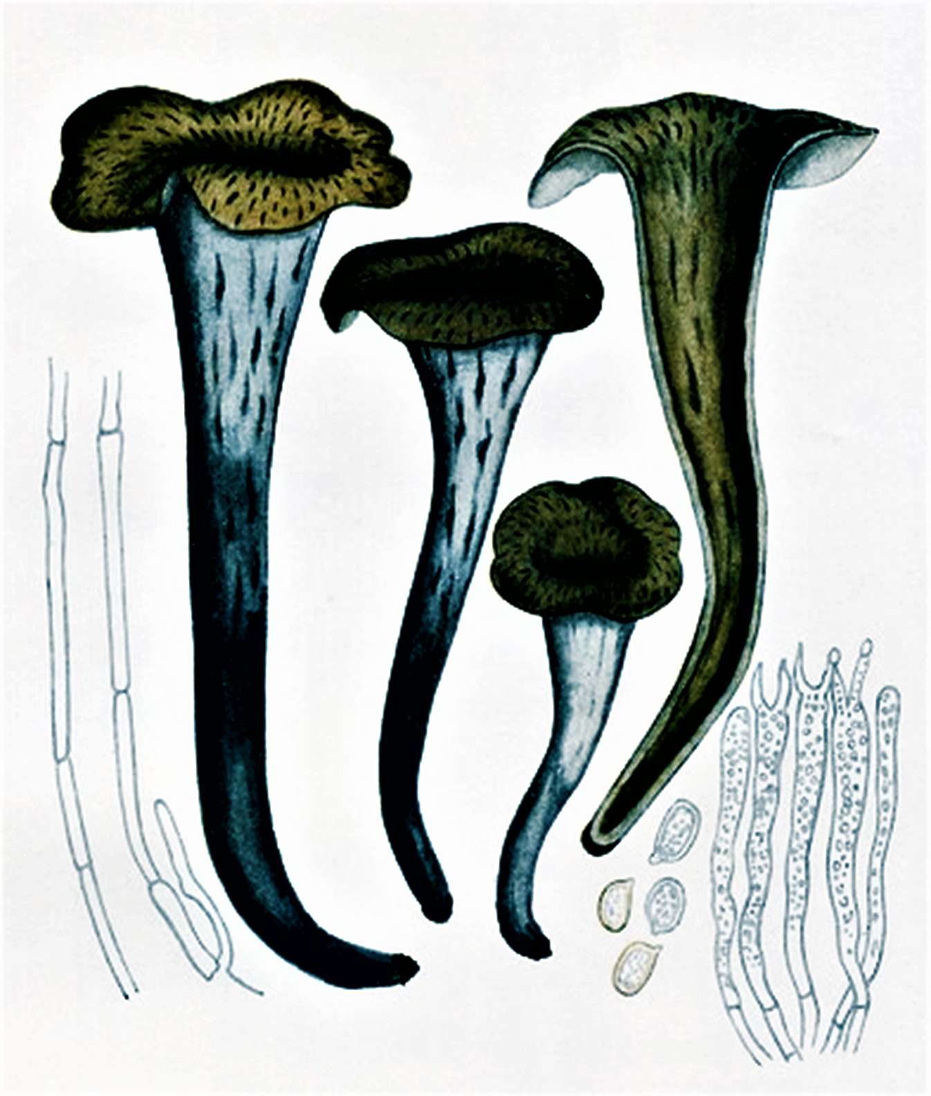 Giacomo Bresadola: Craterellus cornucopioides (L., 1753 (Pers., 1825)